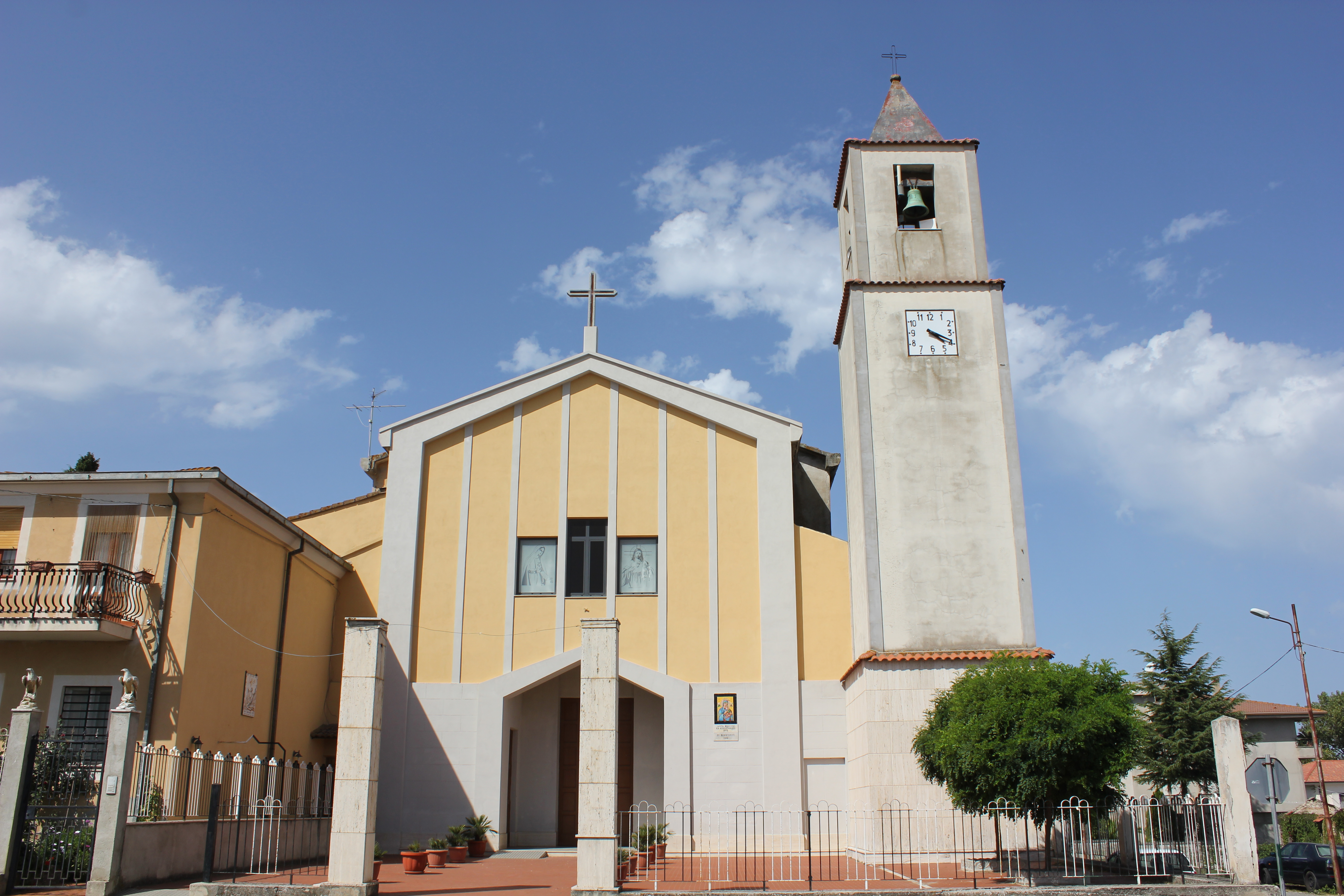 Iglesia frente a la plaza principal de Zungri